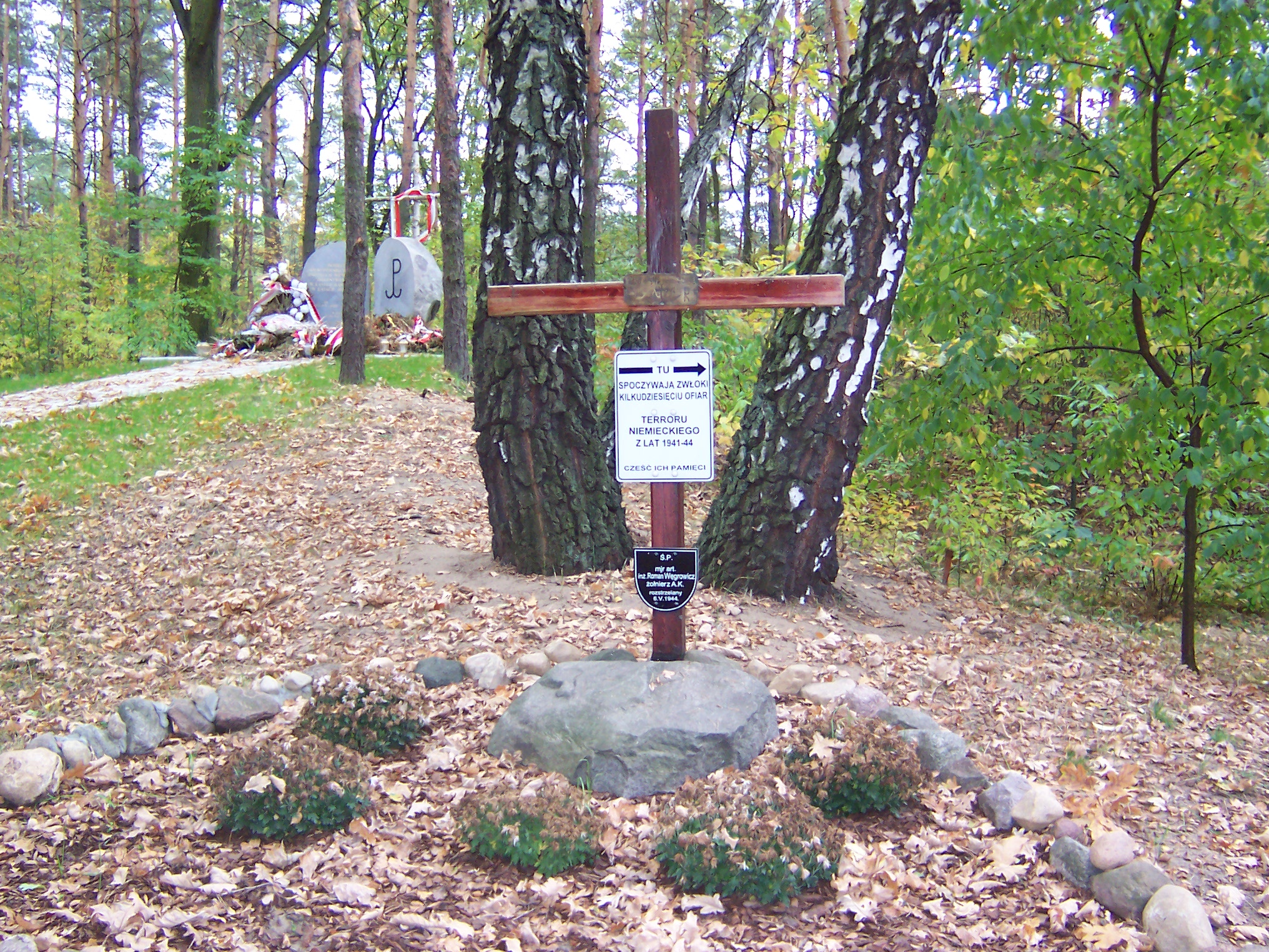 Krzyż pamiątkowy w miejscu egzekucji niemieckich w lasach Kawęczyna.JPG